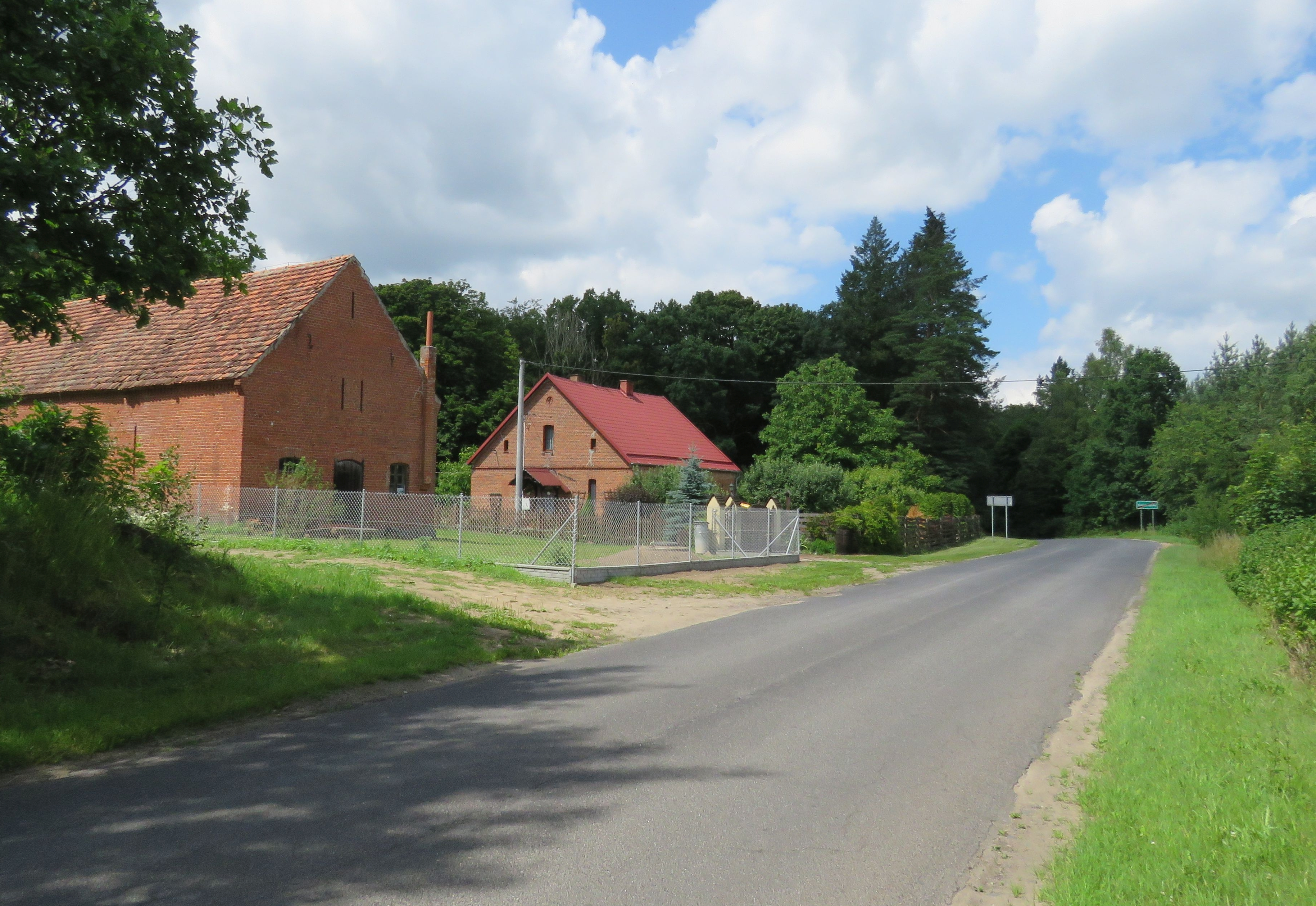 Katarzynki - osada w gminie Iława